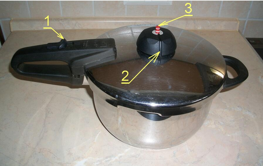 Pressure cooker, overview Schnellkochtopf, Ansicht